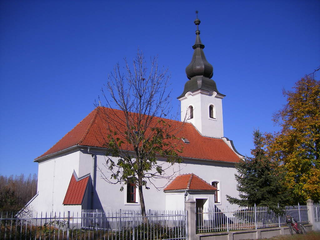 Csilizradvány - református templom